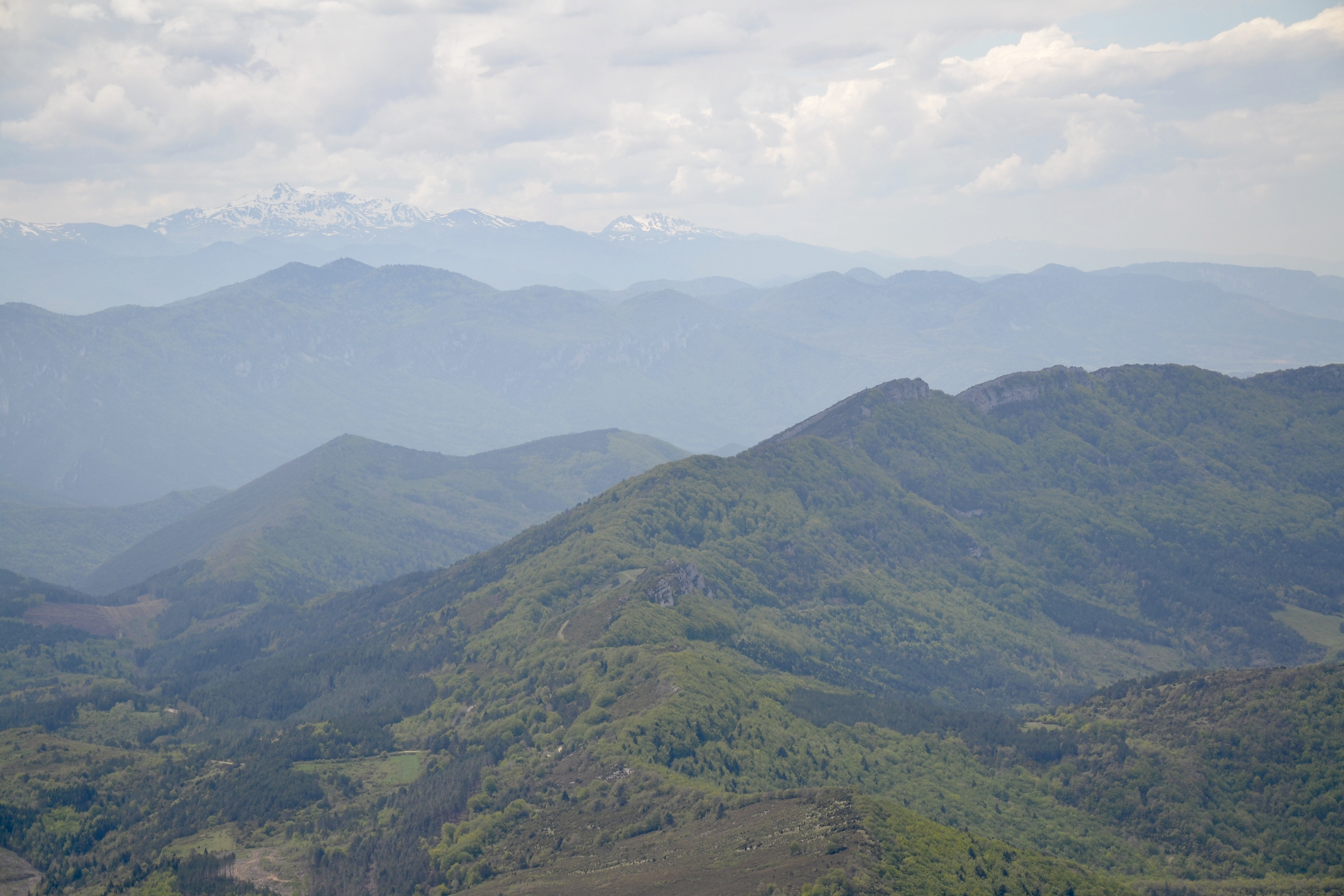 Paysage au sommet du pech de Bugarach (Aude, France). En arrière-plan, le Madrès.